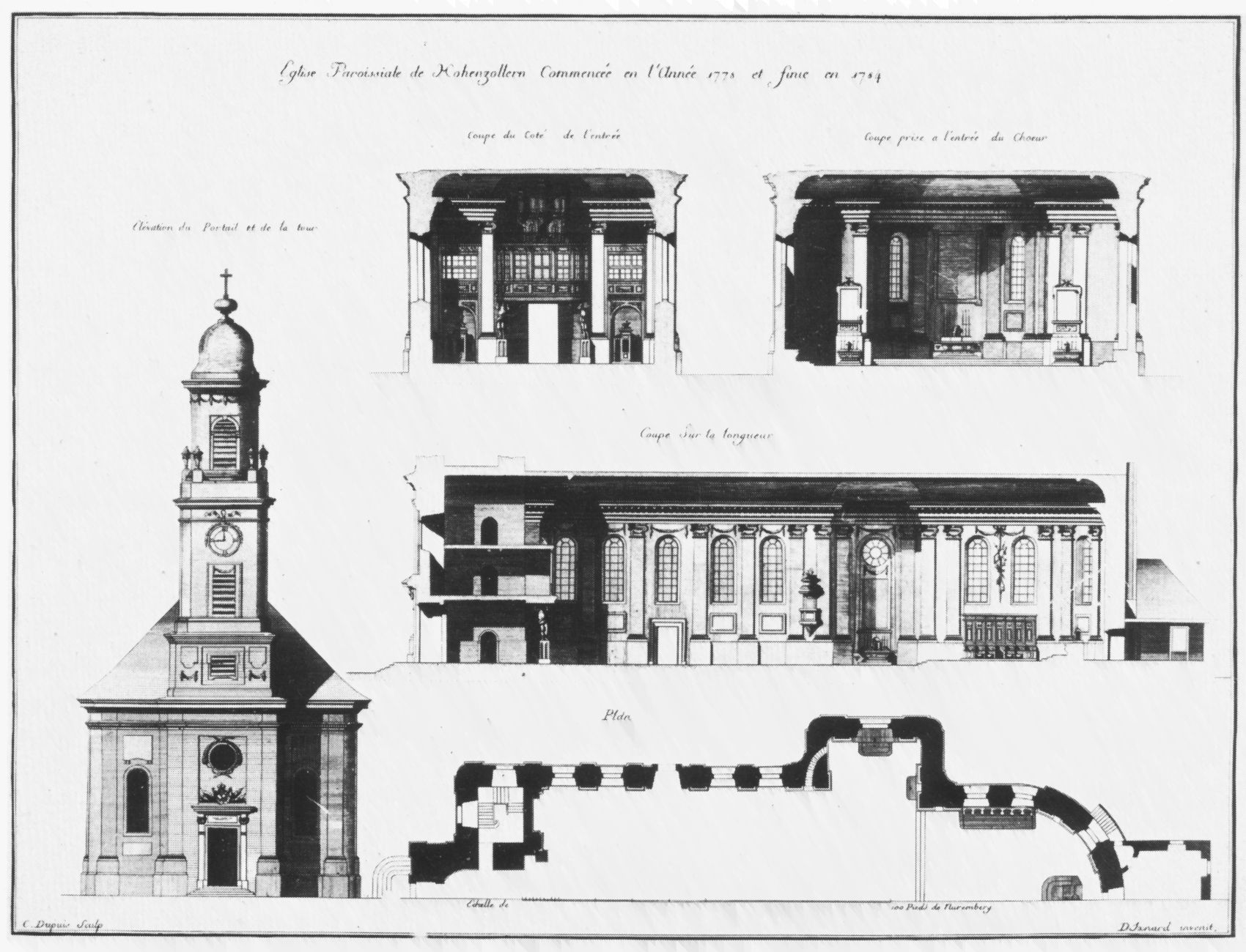 Plan der Stiftskirche in Hechingen, Baden-Württemberg, Deutschland